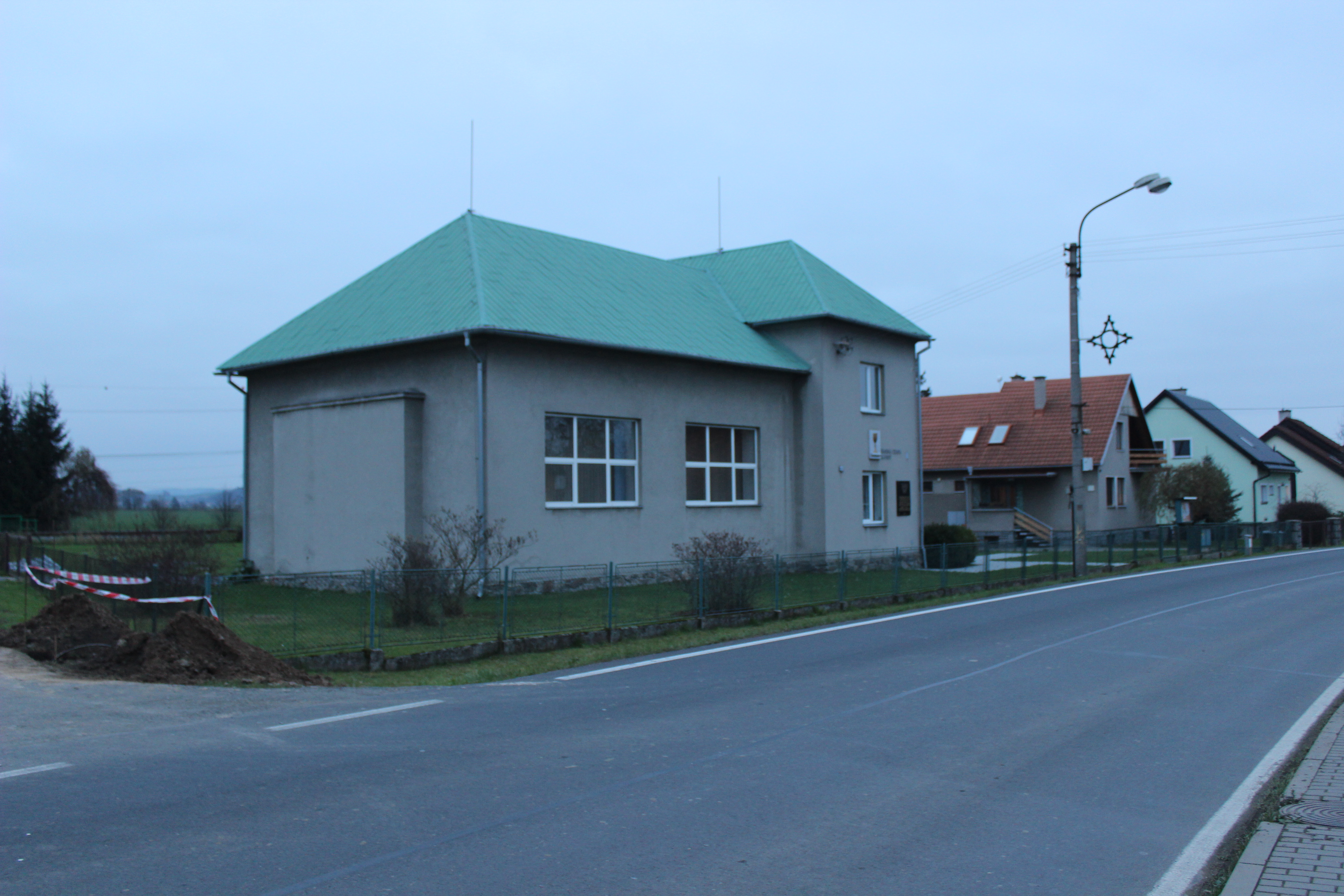 Modlitebna Bratrské jednoty baptistů ve Vikýřovicích.